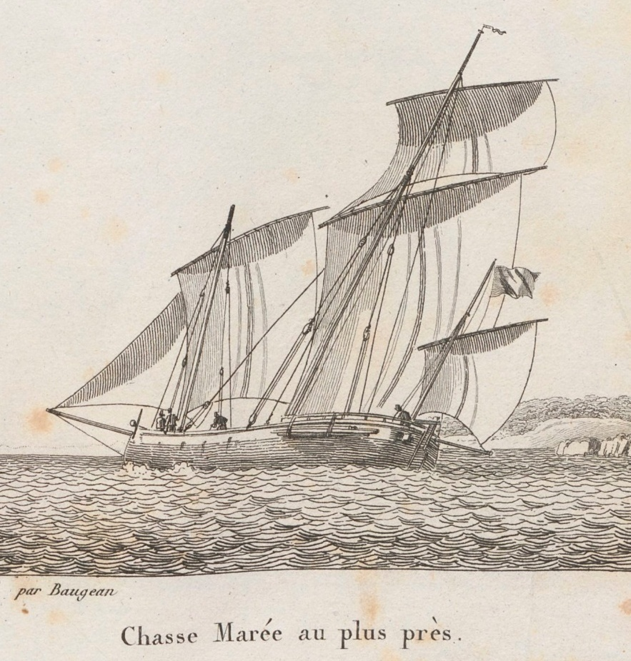 Gravure publiée en 1826 dans la Collection de toutes les espèces de bâtiments de guerre et de bâtiments marchands qui naviguent sur l'Océan et dans la Méditerranée, dessinée d'après nature et gravée par Baugean mais réalisée avant 1819 (date de la mort de l'auteur).